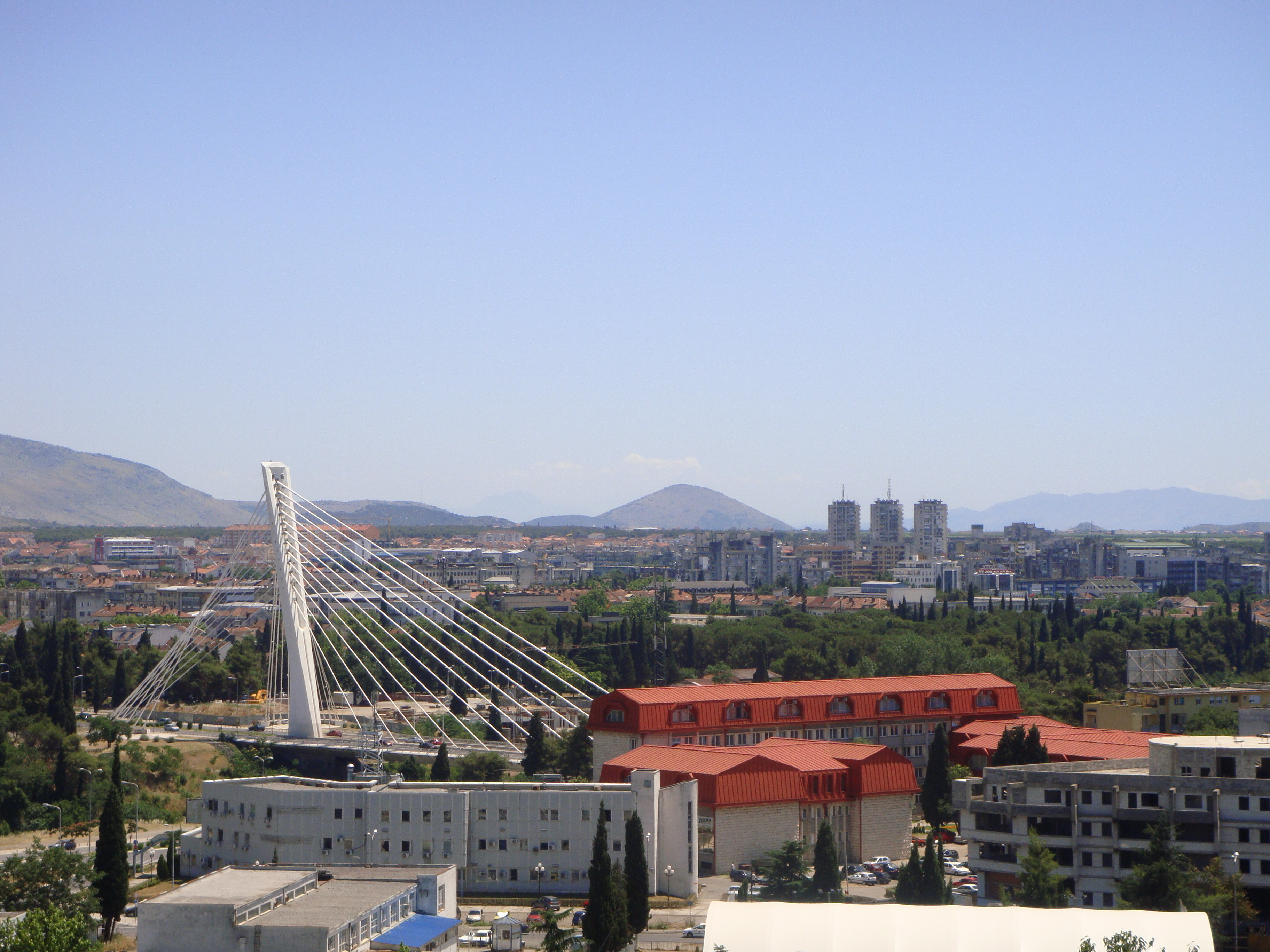 Moj grad